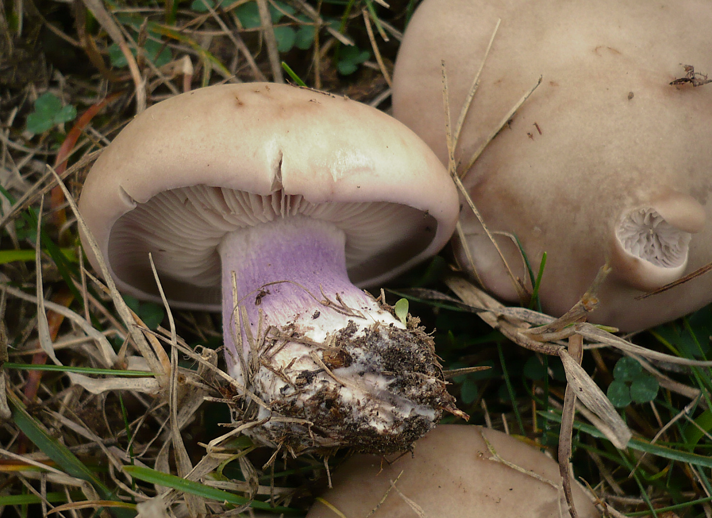 Lepista saeva (Fr.) P.D. Orton